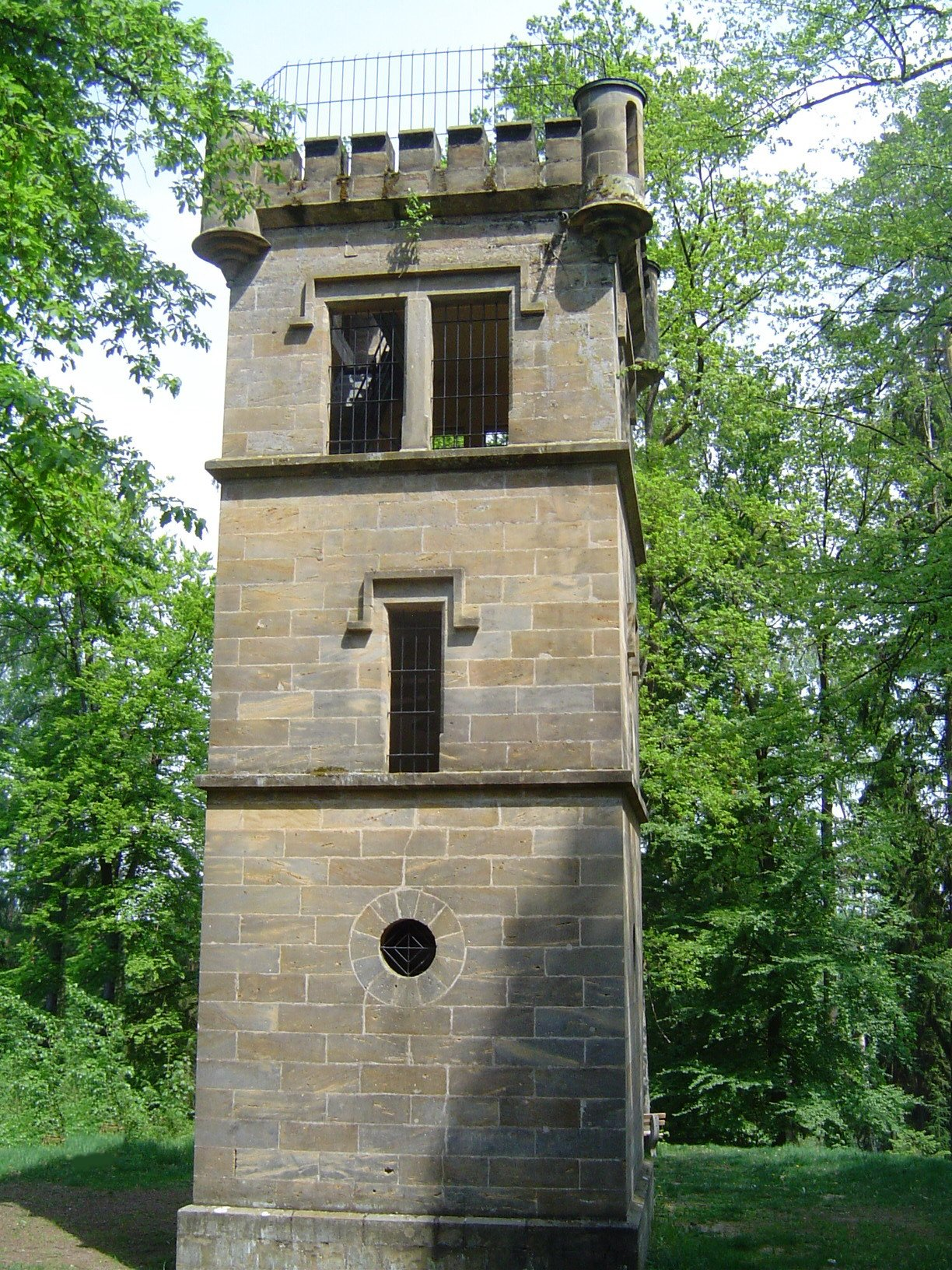 Eckersdorf (Ortsteil Donndorf) - Siegesturm im Schloss Fantasie-Park